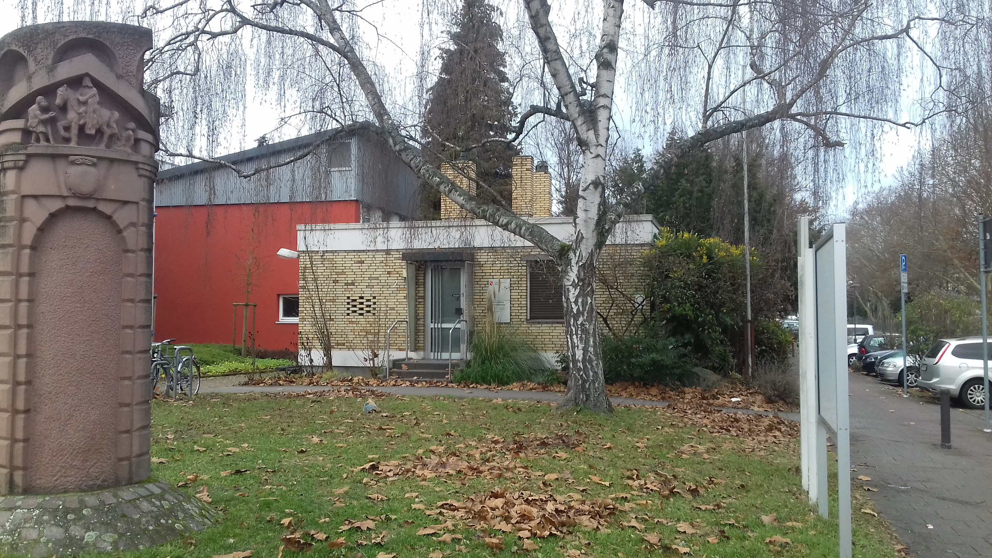 Die Ortsverwaltung im Mainzer Stadtteil Oberstadt, Januar 2019